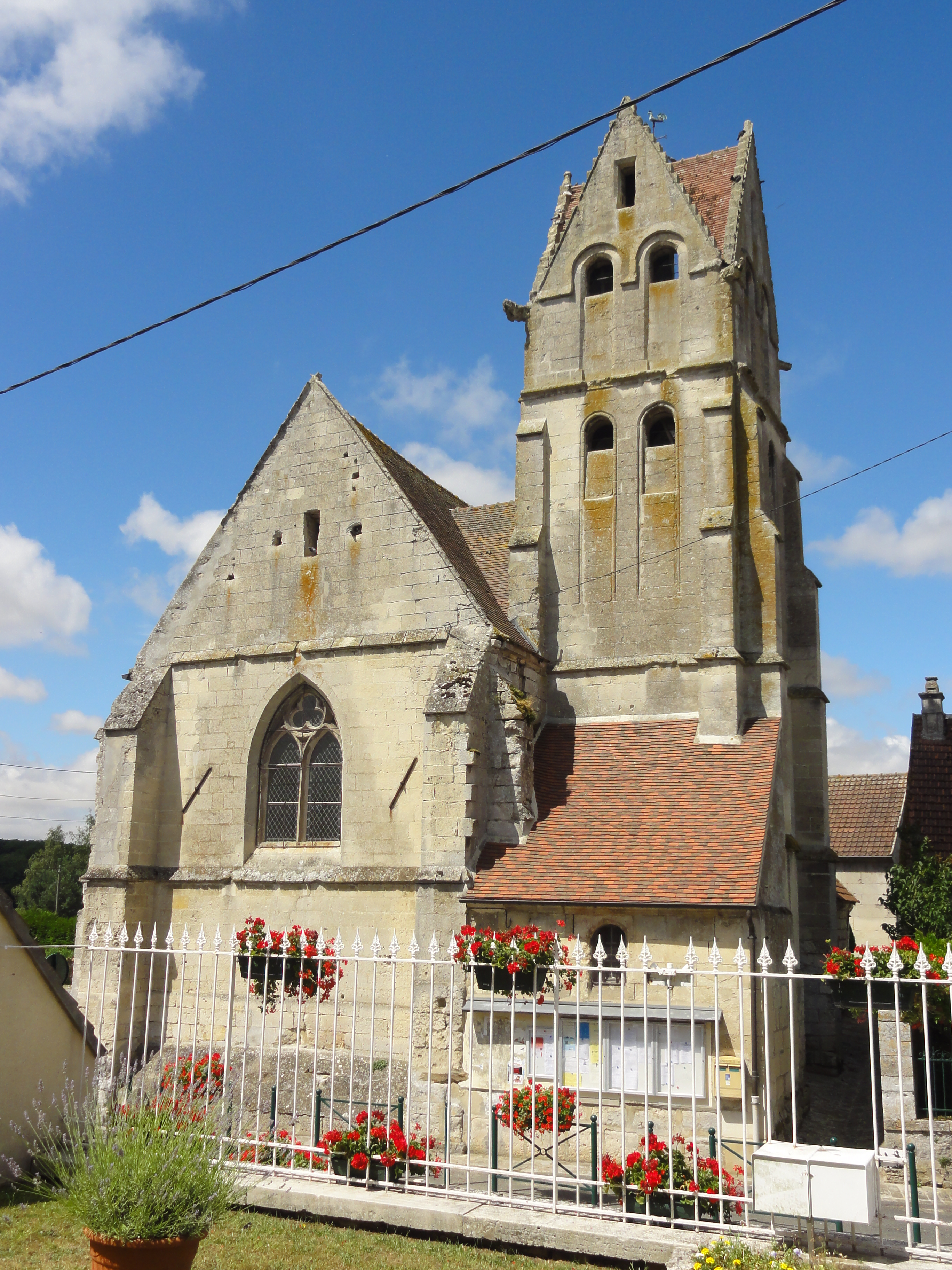 Église Saint-Léger d'Éméville (voir titre).